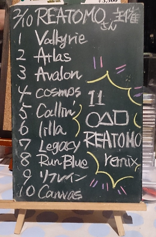 amiinAセトリボード(20180210(1))